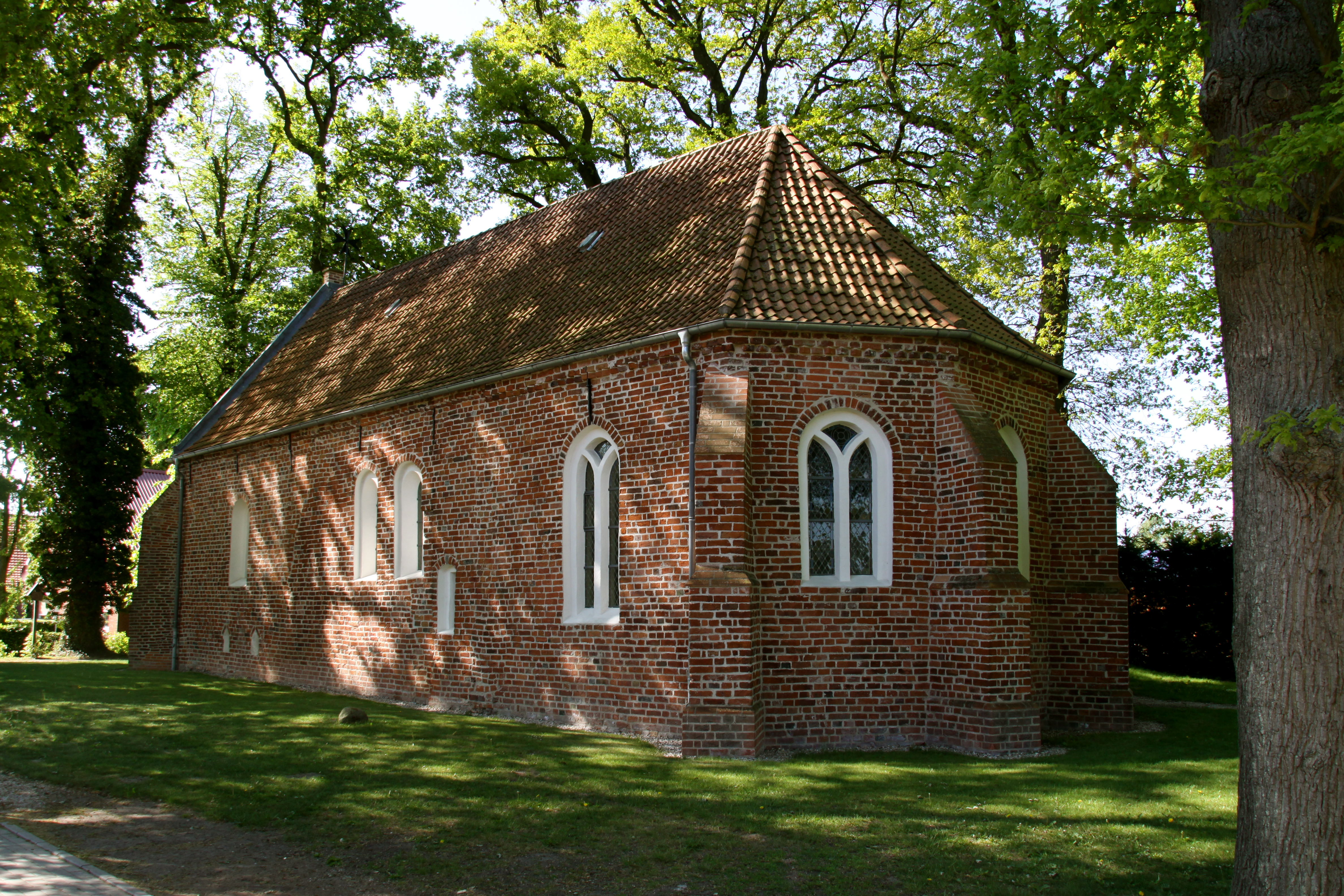 Johanniterkapelle Bokelesch